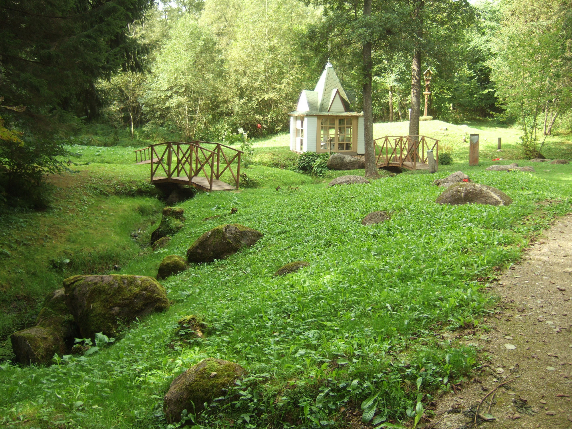 Skudutiškio apreiškimo vieta